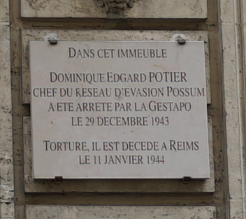 à Reims.